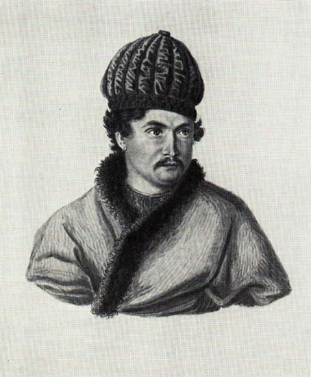 Барятинский Александр Петрович